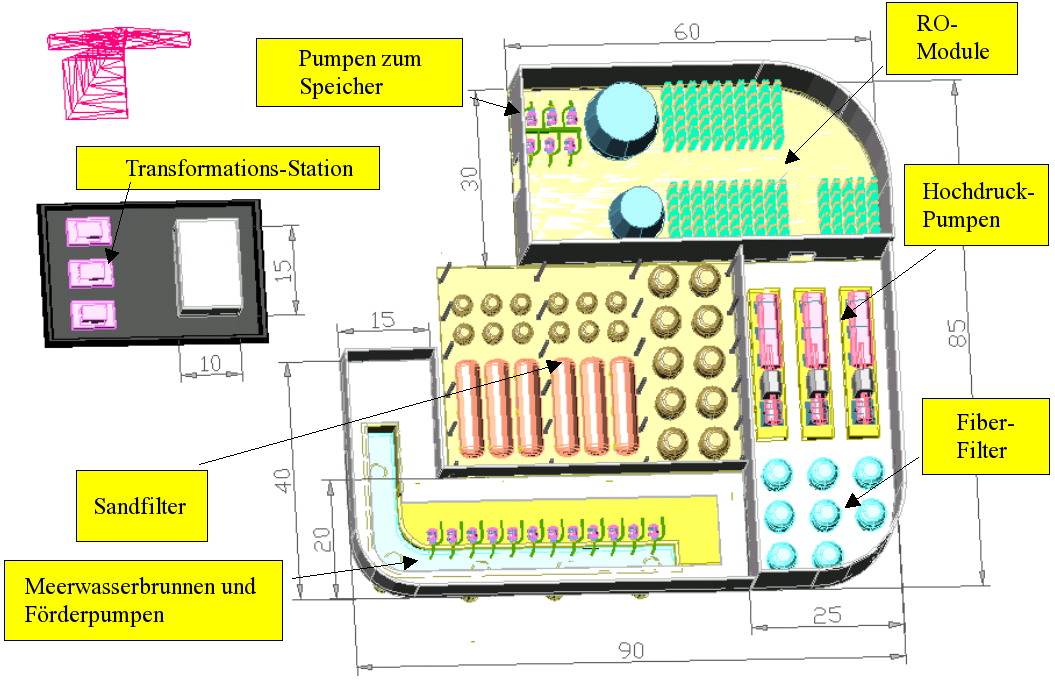 Industrielle Anlage zur Umkehrosmose Von mir als Teil einer Erstsemesterarbeit erstellt; basiert auf Nachforschungen im Internet, Büchern und mit Hilfe eines Professors, der sich darauf spezialisiert.